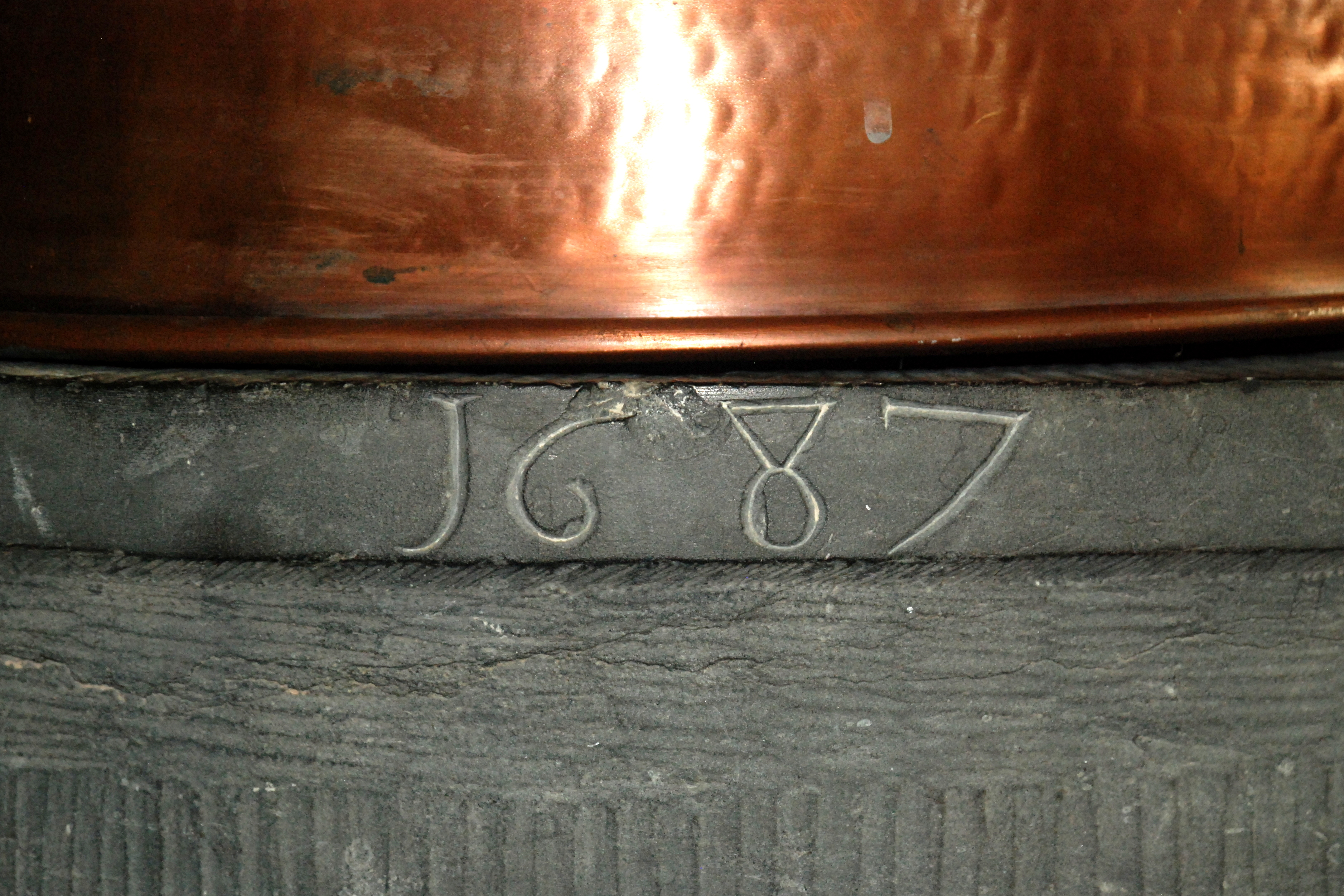 Belgique - Brabant wallon - Jodoigne - Saint-Remy-Geest - Église Saint-Remy